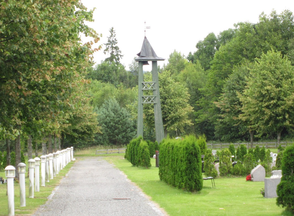 Eik gravlund, Bamble kommune, Telemark